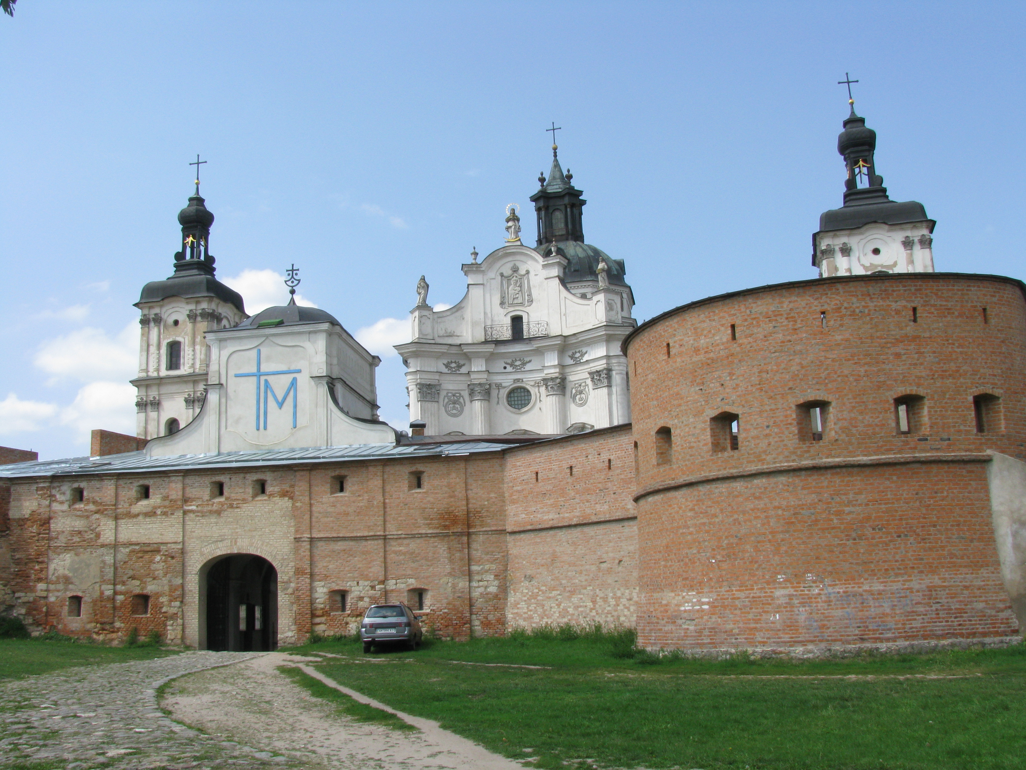 Кармелітський монастир, Бердичів, Соборна пл., 25